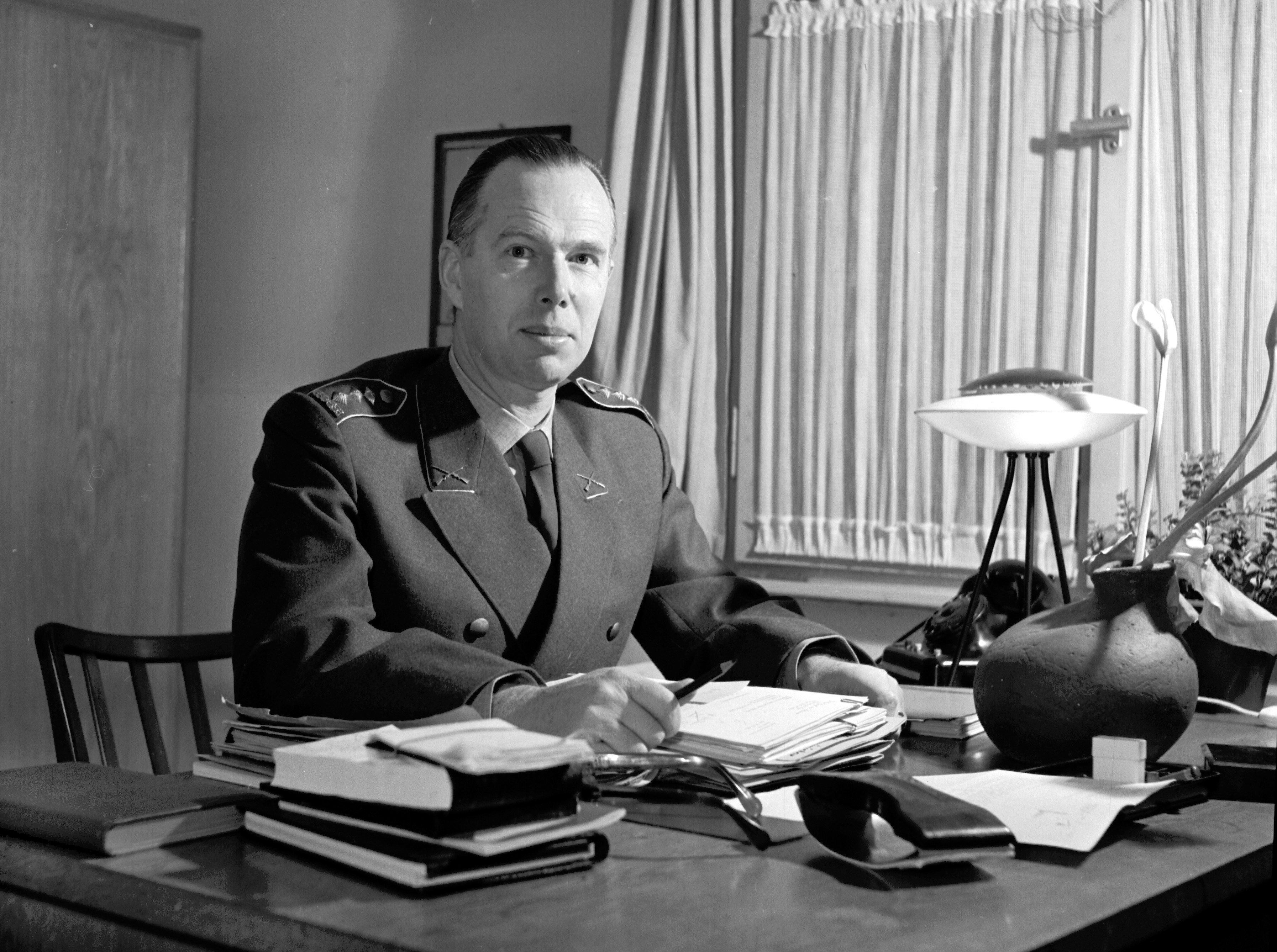 Oberst Graf Wolf von Baudissin. Wolf Stefan Traugott Graf von Baudissin (* 8. Mai 1907 in Trier; † 5. Juni 1993 in Hamburg) war ein deutscher General, Militärtheoretiker und Friedensforscher. Graf Wolf von Baudissin war maßgeblich am Aufbau der Bundeswehr und insbesondere an der Entwicklung der Inneren Führung beteiligt. ©Bundeswehr/Munker